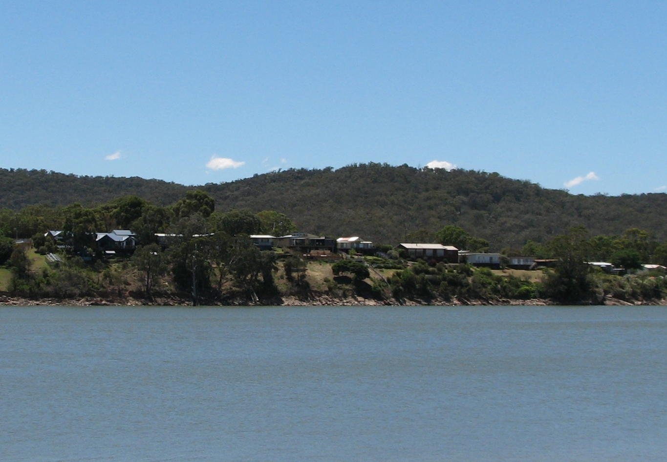 Lake Glenmaggie, Victoria